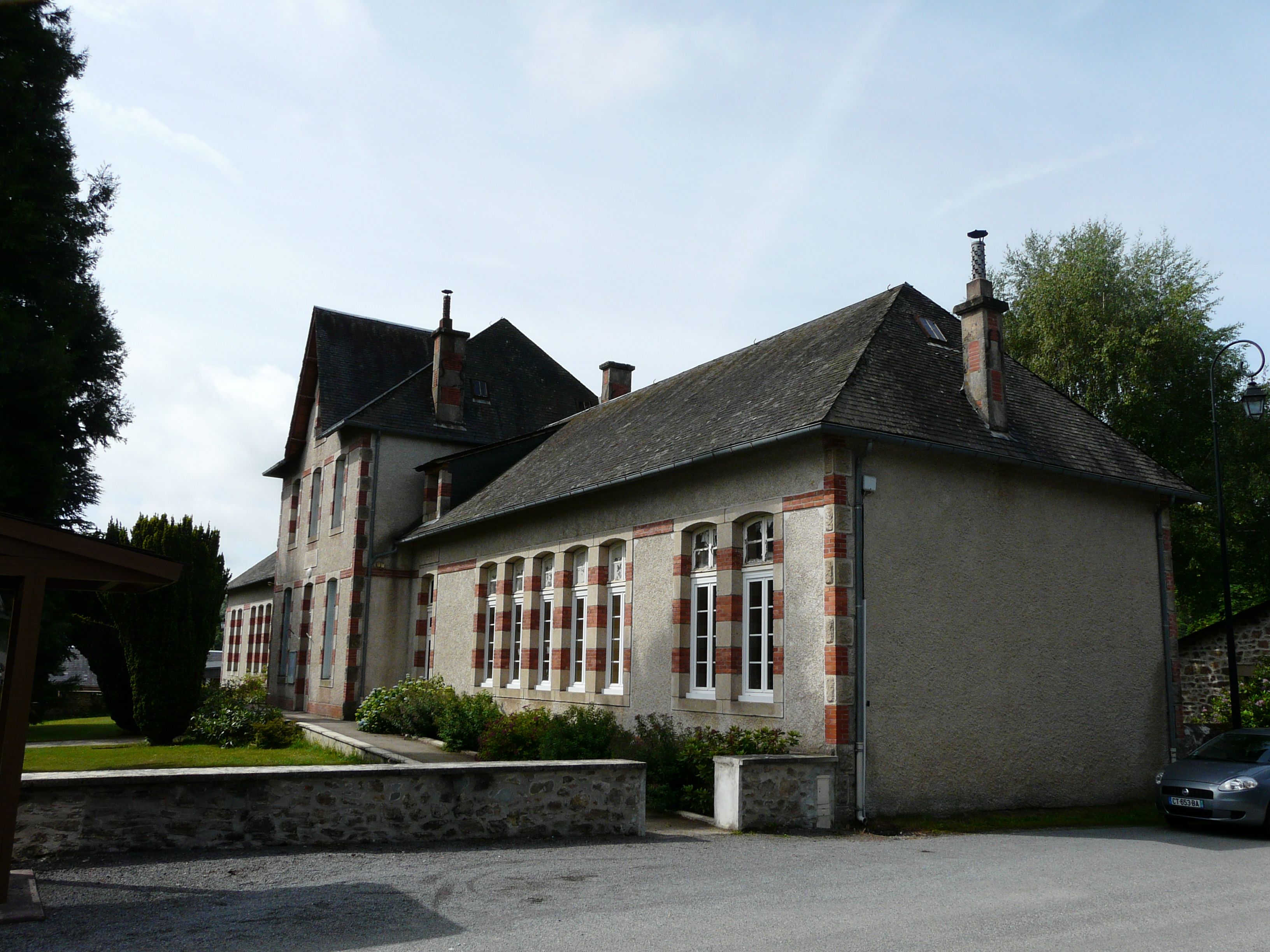 Le bâtiment de la mairie-école de Saint-Étienne-aux-Clos, Corrèze, France.